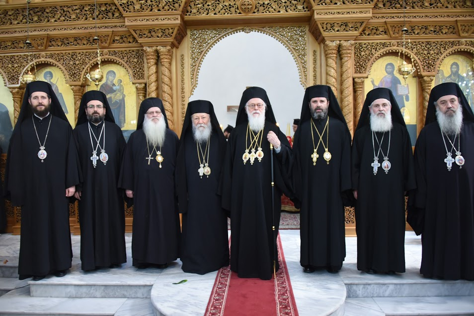 Sinodi i Shenjtë i Kishës Orthodhokse Autoqefale të Shqipërisë